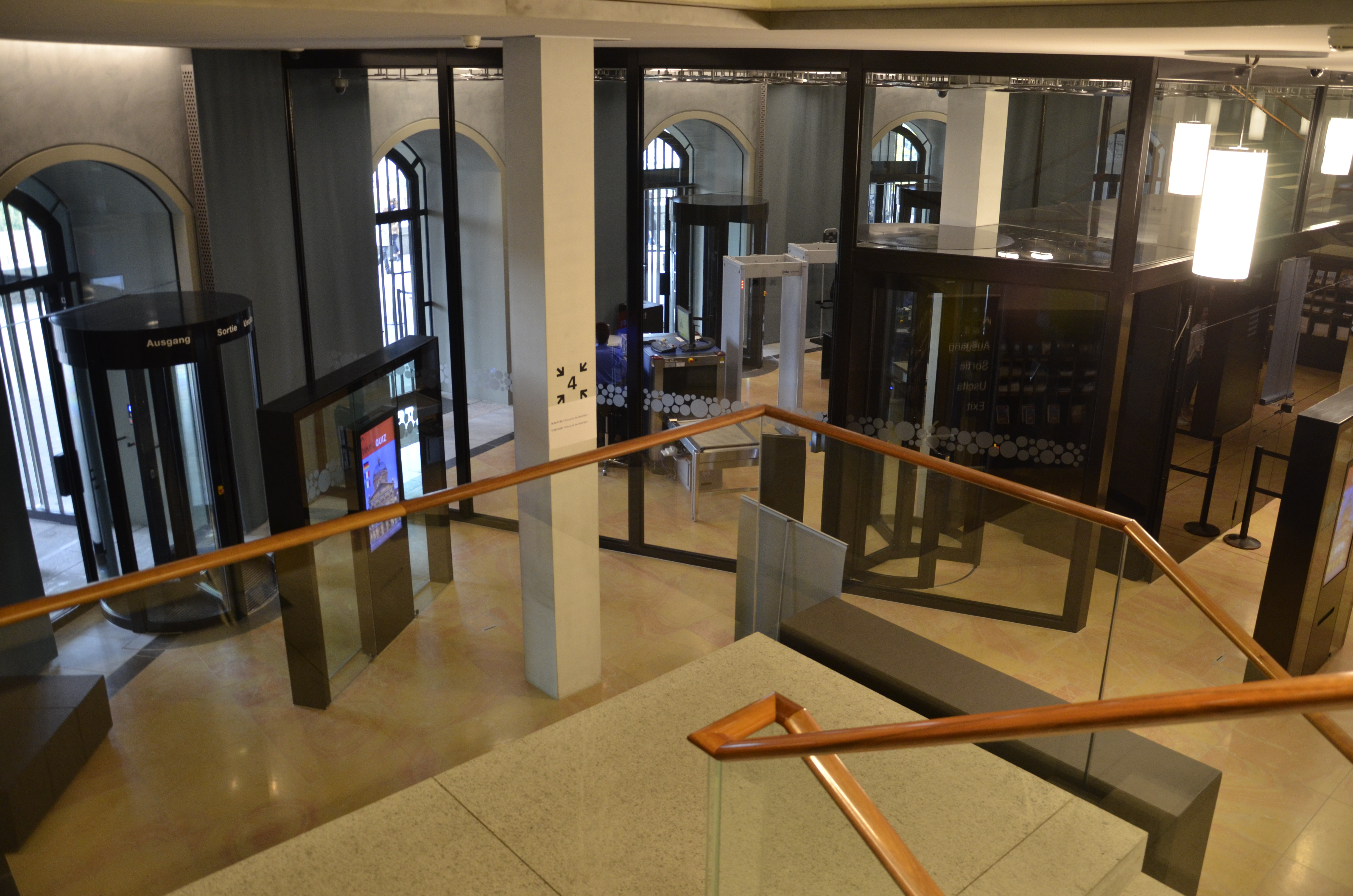 Bundeshaus Bern: der Besuchereingang nach dem Umbau im Sommer 2019. In der Mitte der Kontrollbereich mit Metalldetektoren, links der Ausgang zur Bundesterrasse.